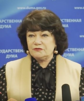 Перед журналистами выступила председатель комитета Госдумы по вопросам семьи Тамара Плетнёва.